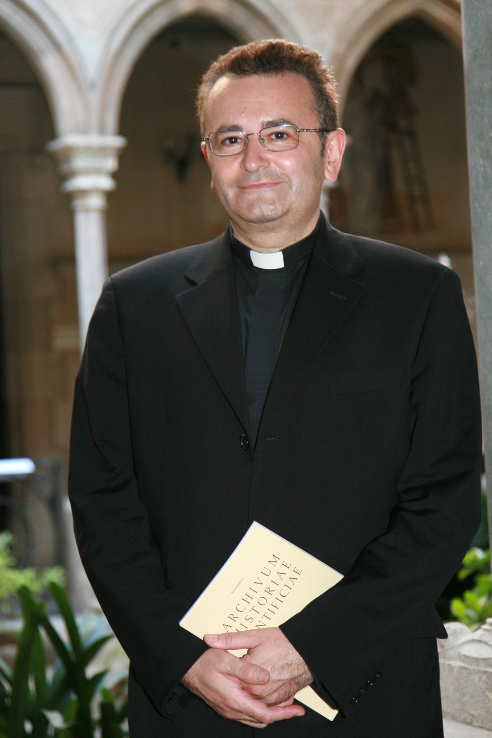 Sacerdot